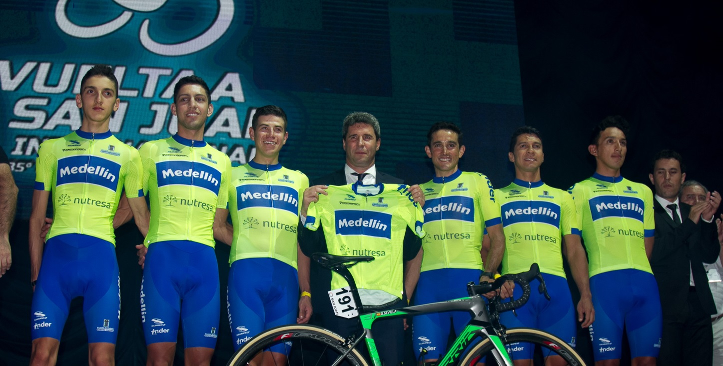 Vuelta a San Juan 2017 - Equipo Medellín-Inder (Colombia) Depicted team: Medellín-Inder